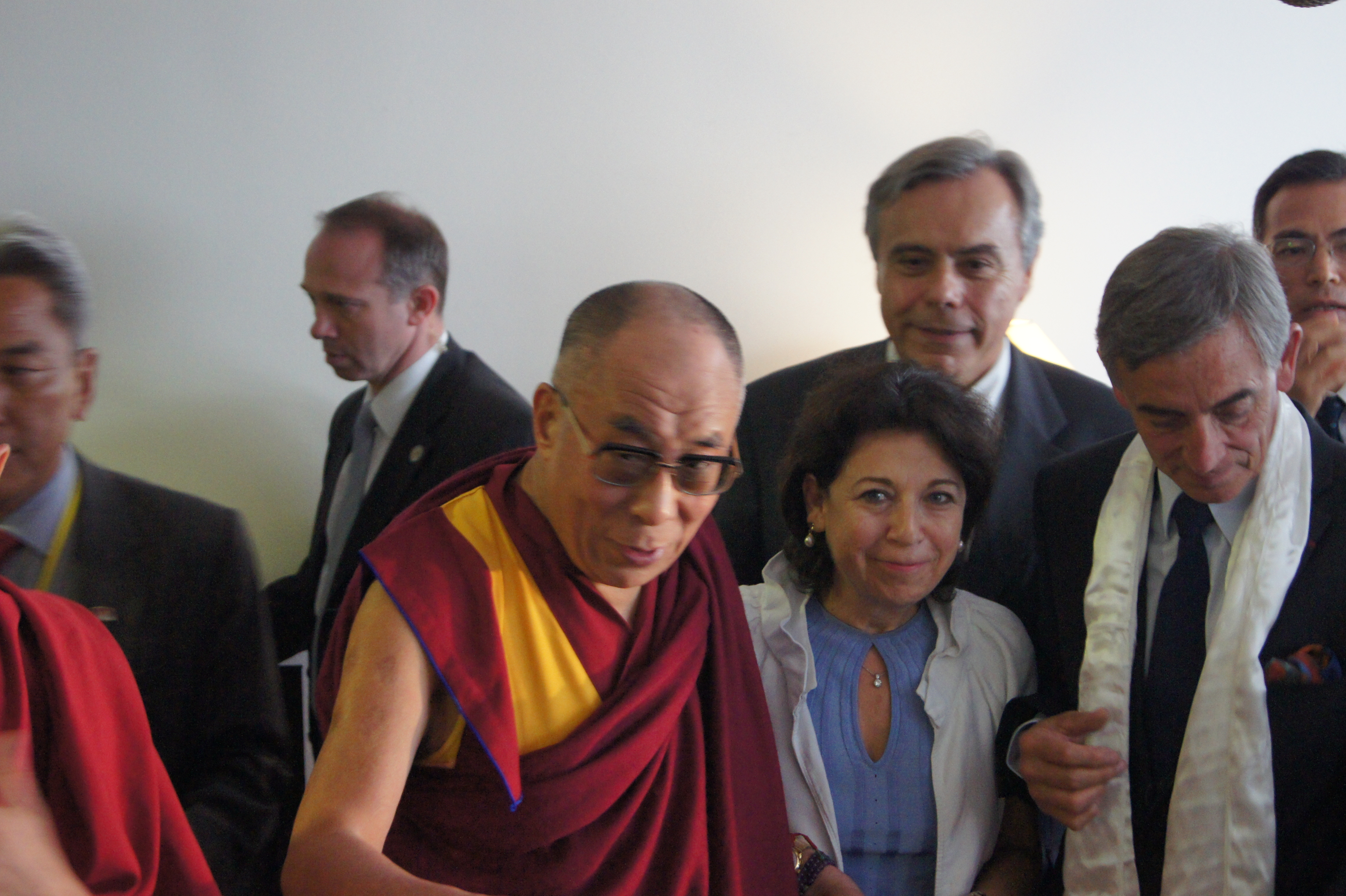 Rencontre des parlementaires avec sa sainteté le Dalaï Lama à Toulouse le 15 août 2011